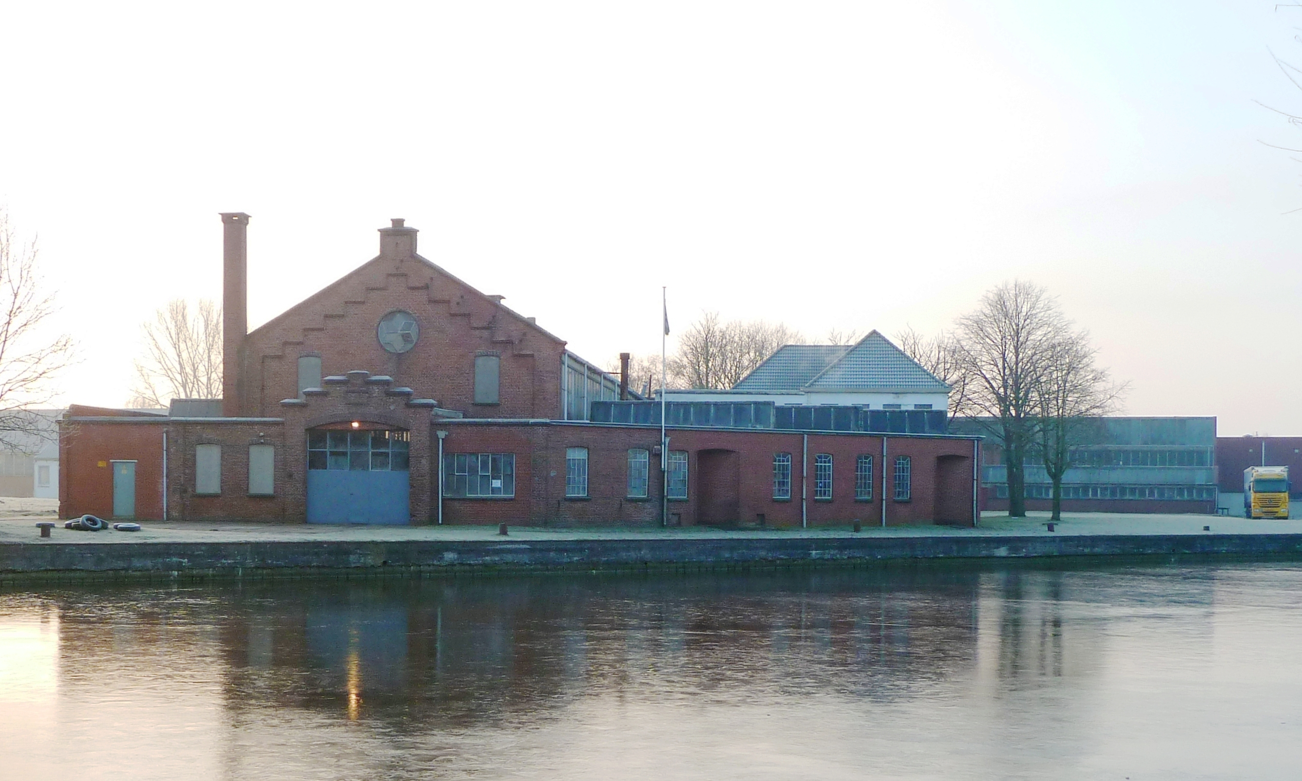 Appingedammer Bronsmotorenfabriek aan het Damsterdiep in Appingedam (tegenover Solwerd). De fabriek werd gebouwd in 1907 en sloot in 2004 haar deuren.